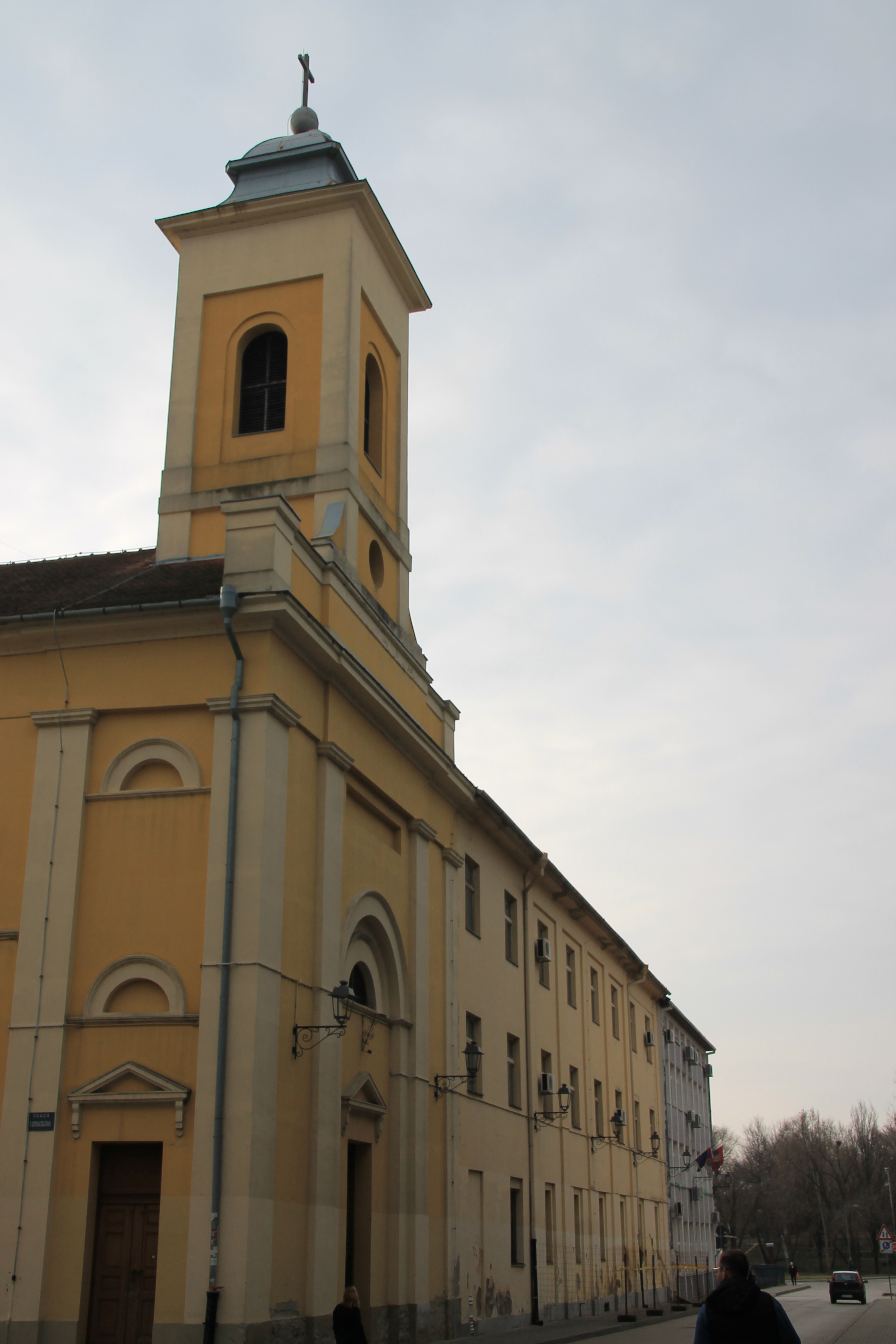 Staro jezgro Zrenjanina